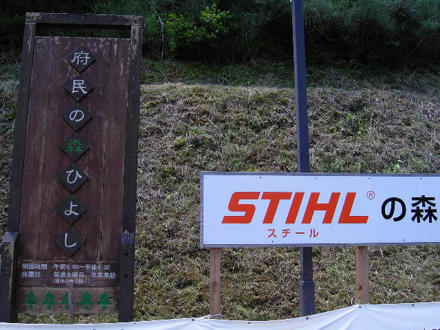 府民の森ひよし（スチールの森 京都）